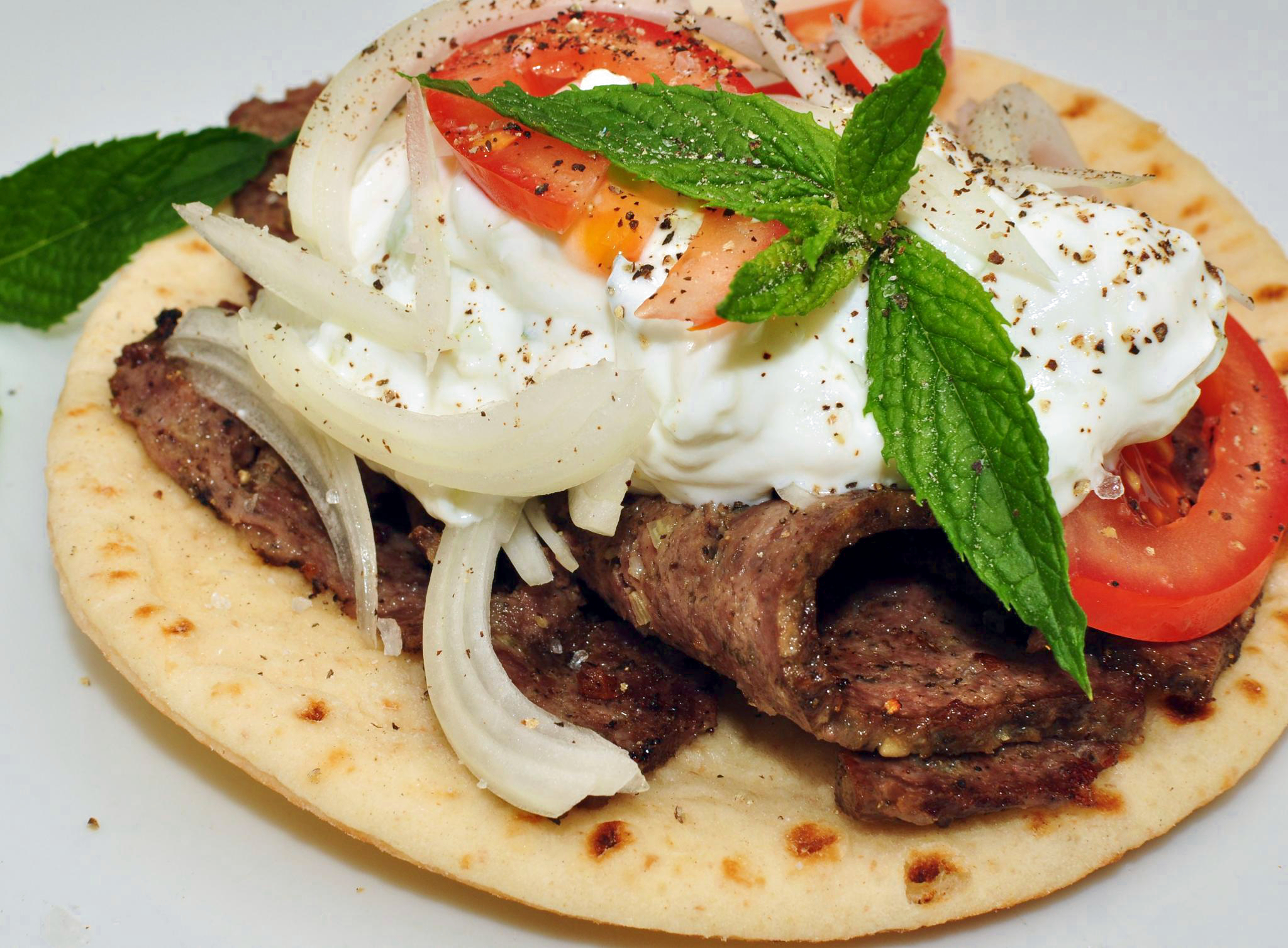 Gyro sandwich